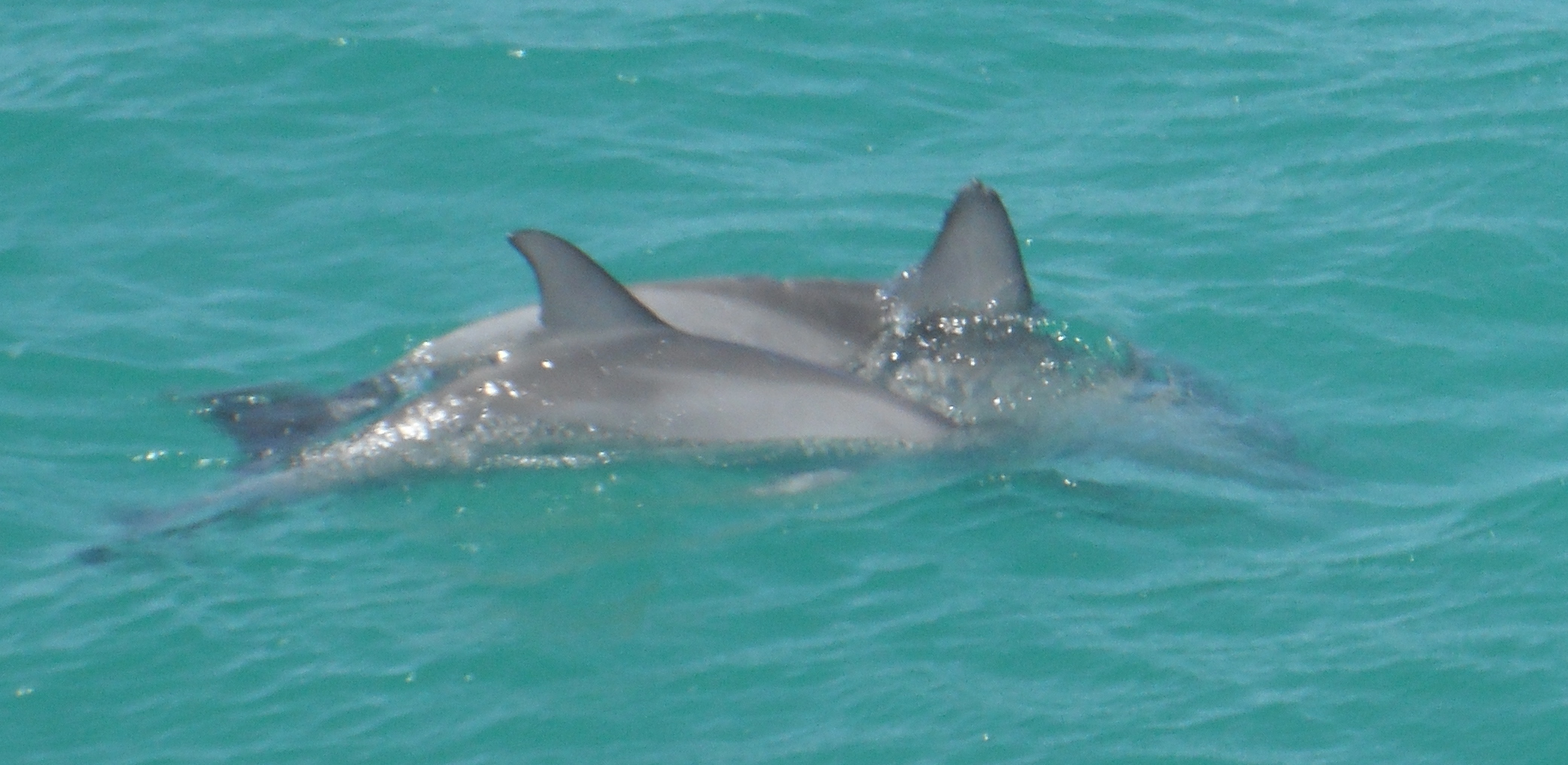 Dolphins - Monkey Mia, WA